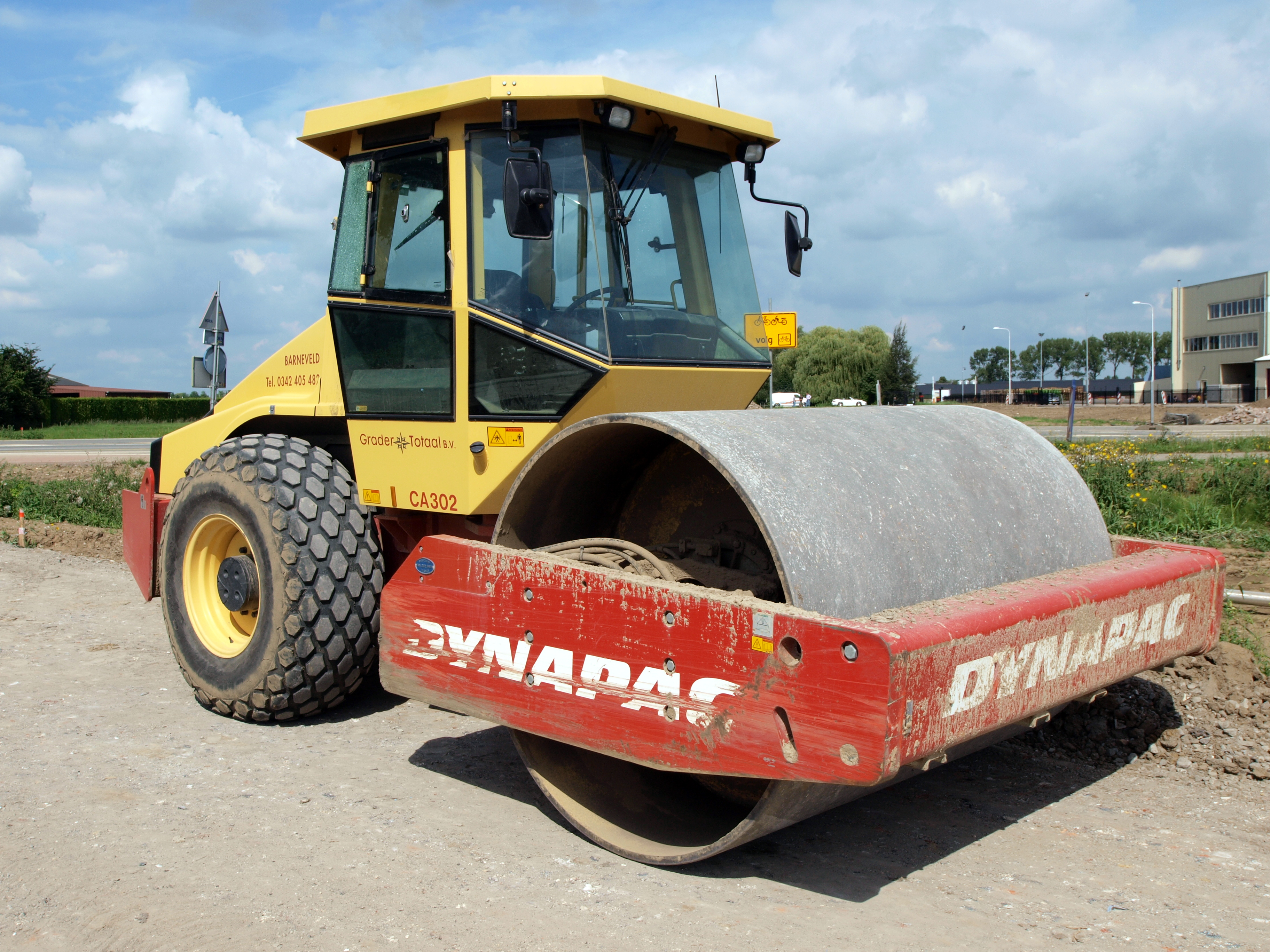 Dynapac CA 302